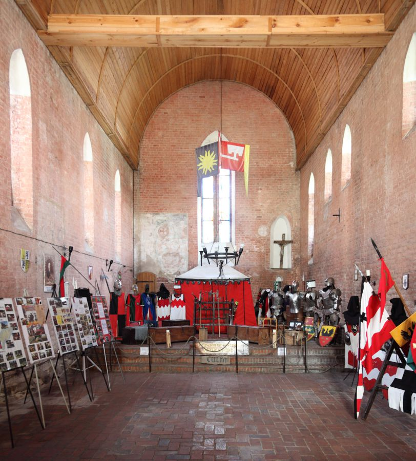 Prezbiterium - stan obecny